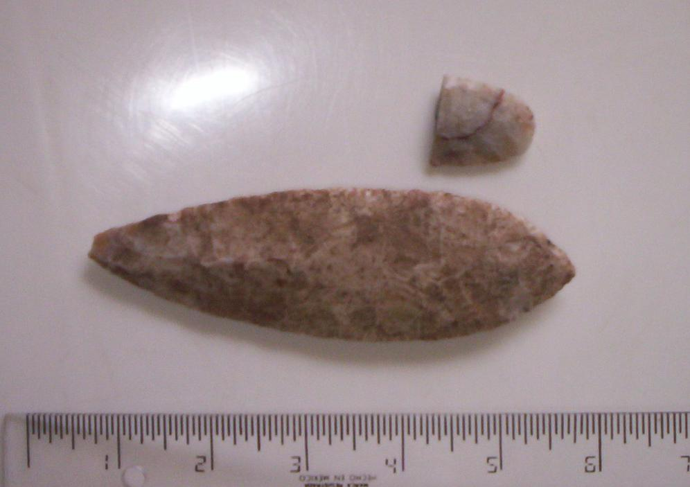 Puntas de Lanza Clovis (11,000 a 9,000 ) El Bosque, Pueblo Nuevo, Departamento de Estelí